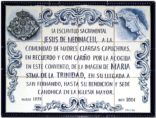 Mosaico cerámico conmemorativo de la estancia de María Santísima de la Trinidad en el convento de "Las Capuchinas", antes de ser bendecida.